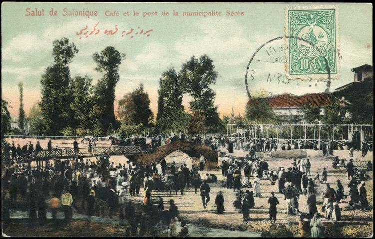 Сяр. Османска пощенска картичка.